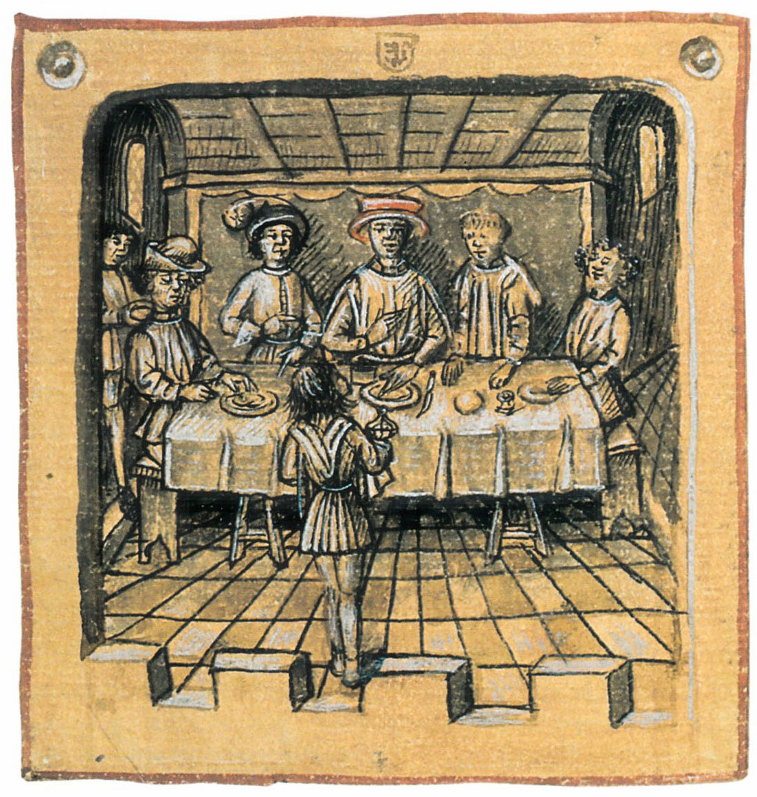 Abbildung zu Beginn des 83. Kapitels des Le Canarien Version B